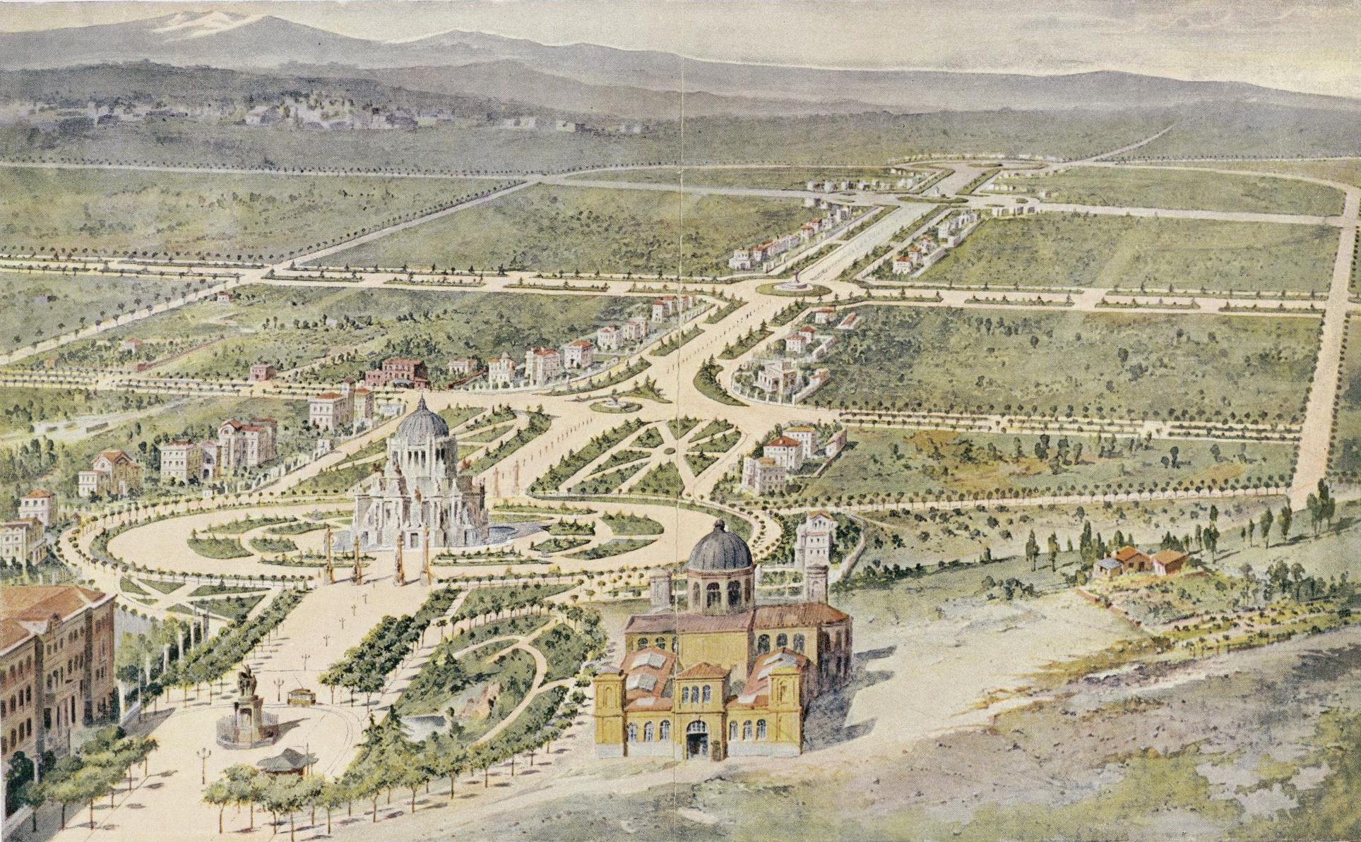 Proyecto para la prolongación del Paseo de la Castellana (Madrid, España), de Pedro Núñez Granes. Forma parte de una carpeta, con un total de tres láminas, referidas al citado proyecto: planta general, sección y perspectiva general (duplicada), firmadas por Pedro Núñez Granés el 1º de marzo de 1916.